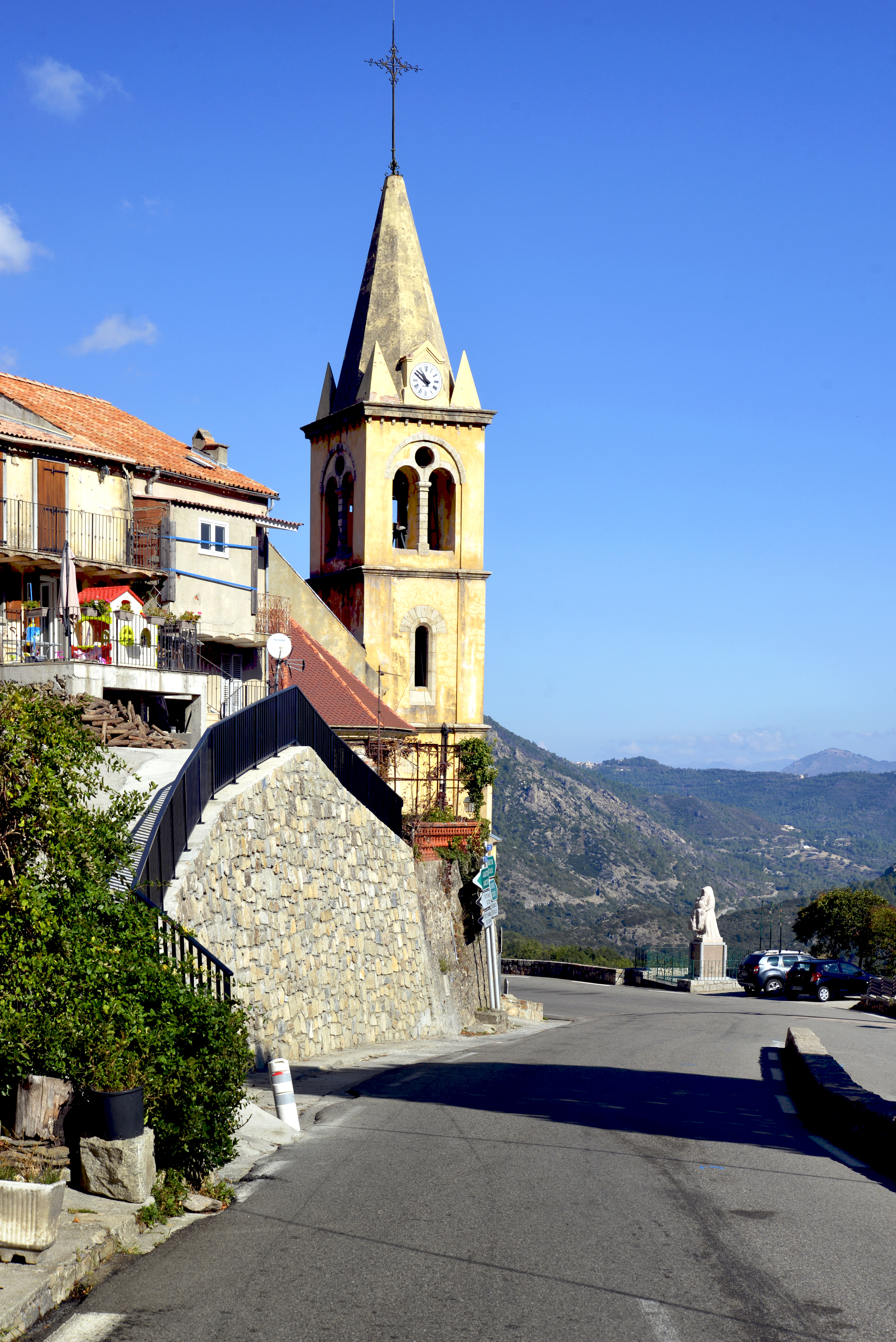 Vivario, Centre Corse (Haute-Corse) - L'église paroissiale Saint-Pierre-aux-liens au centre du village, à la jonction des routes T20 et D343 (route de Muracciole). En face, le monument aux morts surmonté d'une Piéta en granit rose poli.